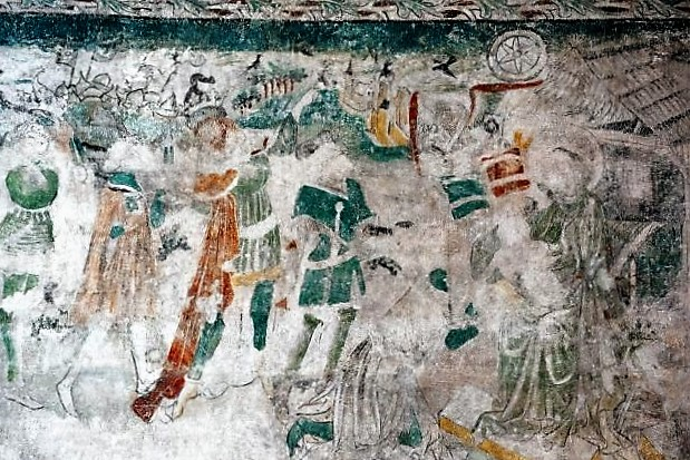 Polichromia kościół filialny w Krzyżowicach, Mistrz Brzeskich Pokłonów Trzech Króli